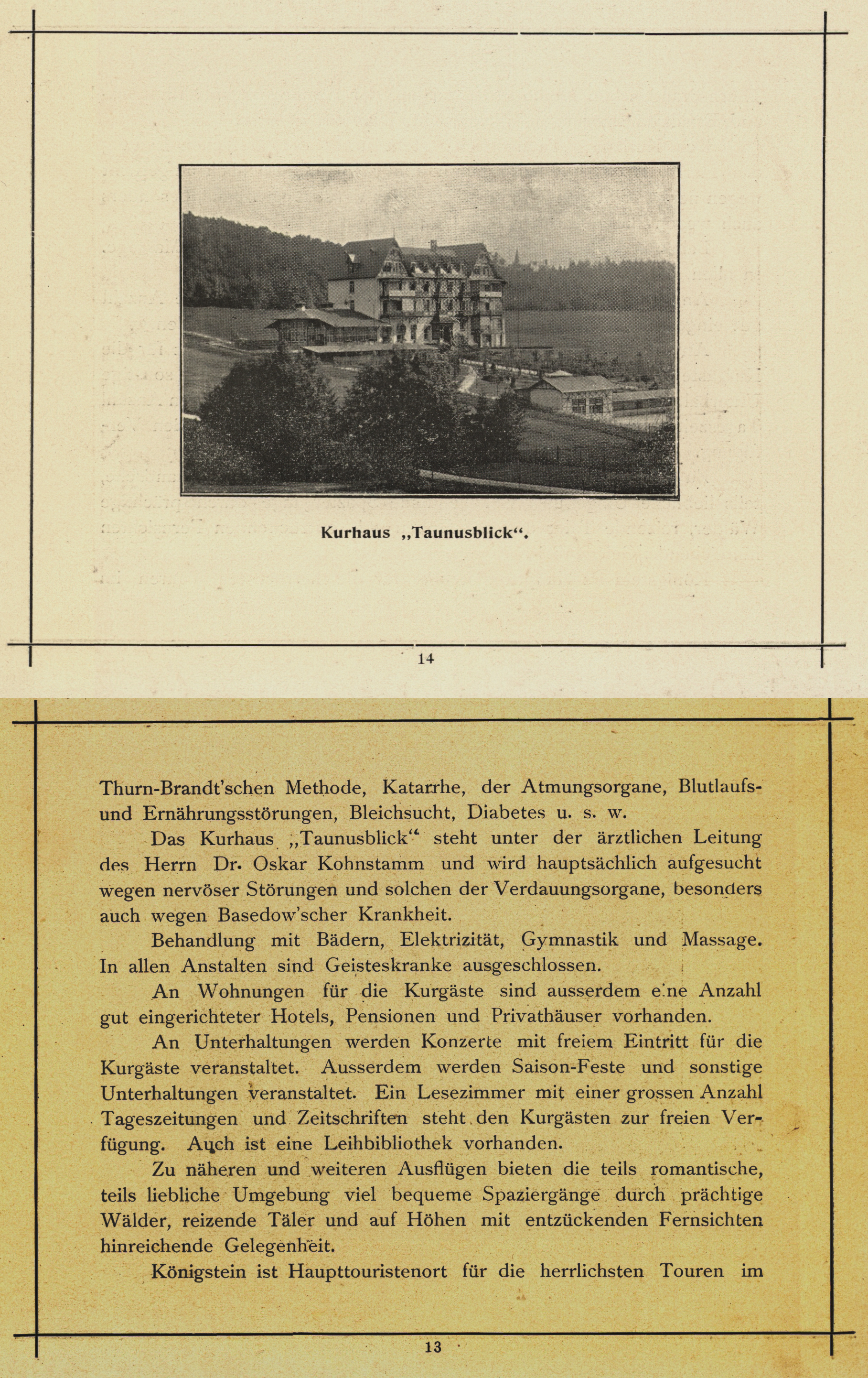 Das Kurhaus "Taunusblick" steht unter der ärztlichen Leitung des Herrn Dr. Oskar Kohnstamm und wird hauptsächlich aufgesucht wegen nervöser Störungen und solchen der Verdauungsorgane, besonders auch wegen Basedow`scher Krankheit. Behandlung mit Bädern, Elektrizität, Gymnastik und Massage.